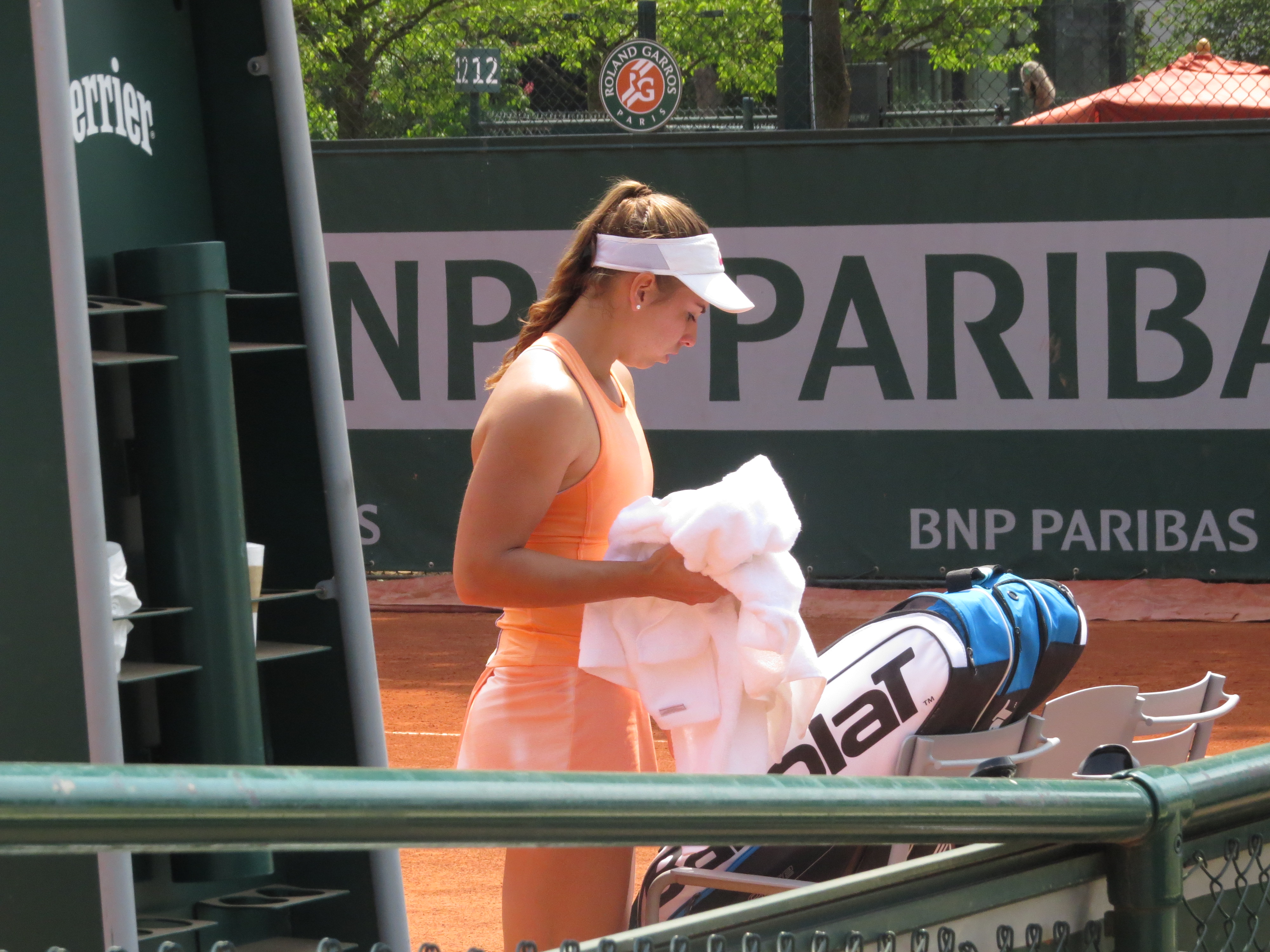 Julia Grabher lors de son premier tour des qualifications face à Polina Monova (court n°13).